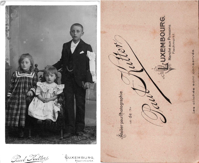 Eng sougenannte Carte de Visite (CdV) vum Fotograf Paul Kutter.